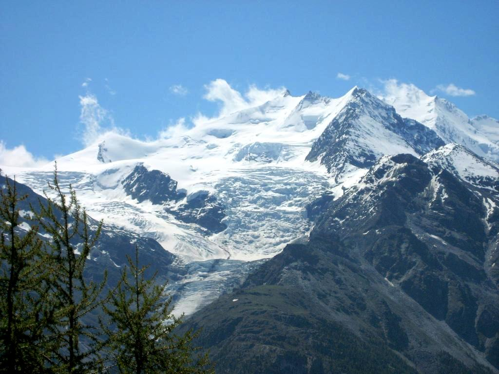 Ried Glacier, Pennine Alps